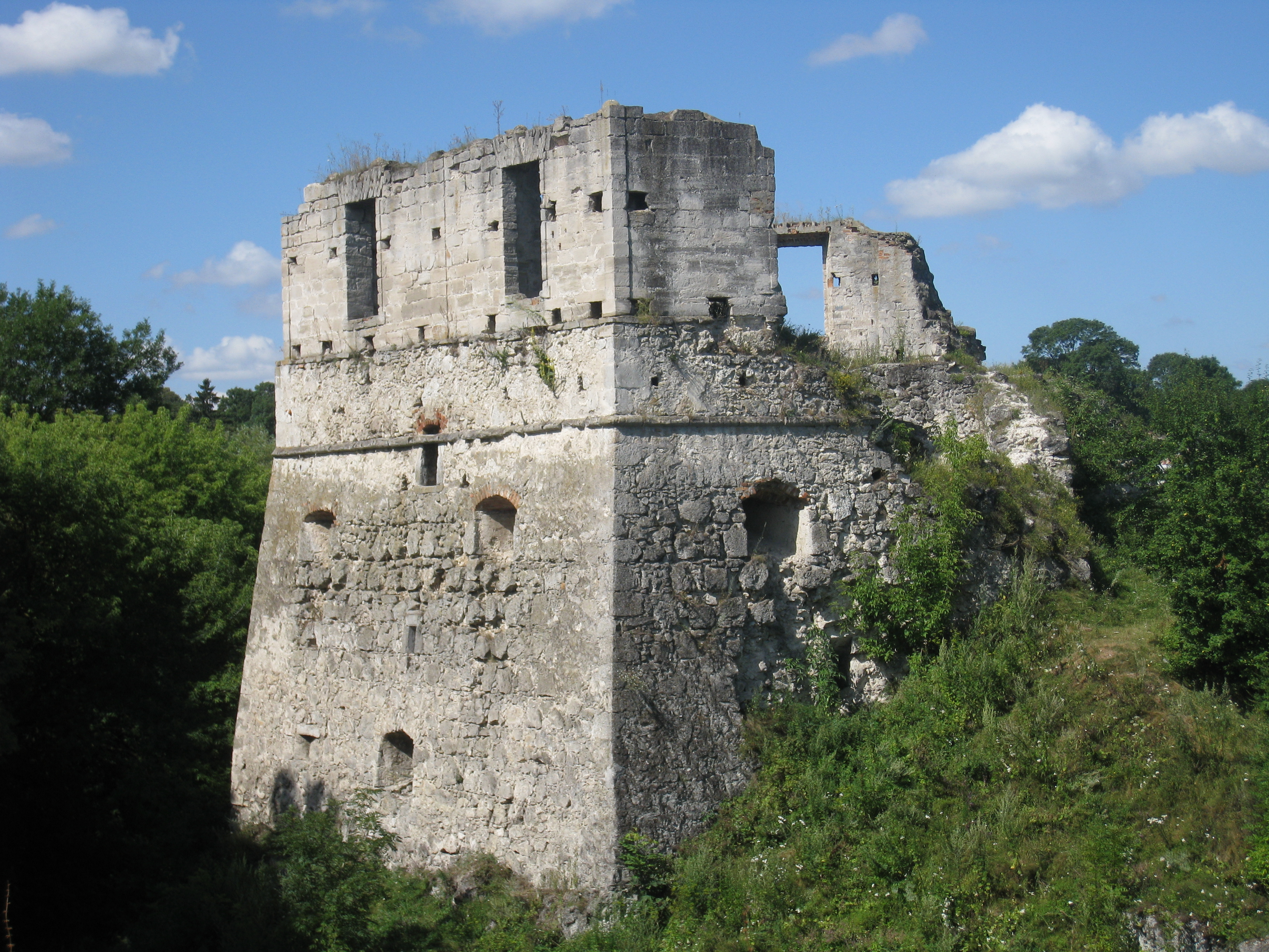 Твердиню в Токах збудував Януш Збаразький (Janusz Zbaraski) (1553-1608 р.), воєвода брацлавський, староста кременецький. Замок височить на скельному півострові, оточений з трьох сторін водоймою.